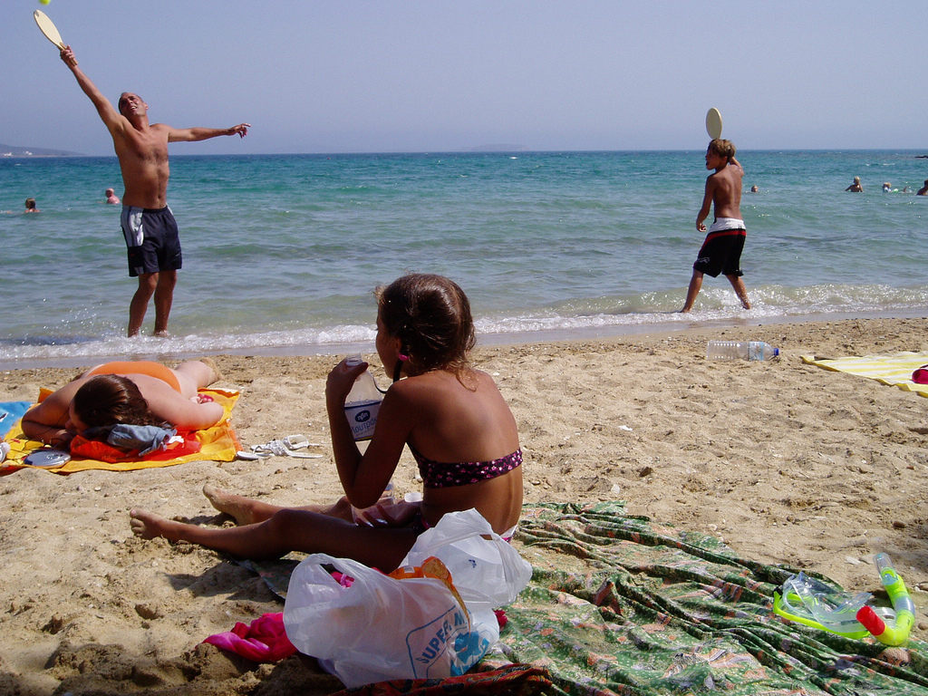 Mats, Jesper and Karin